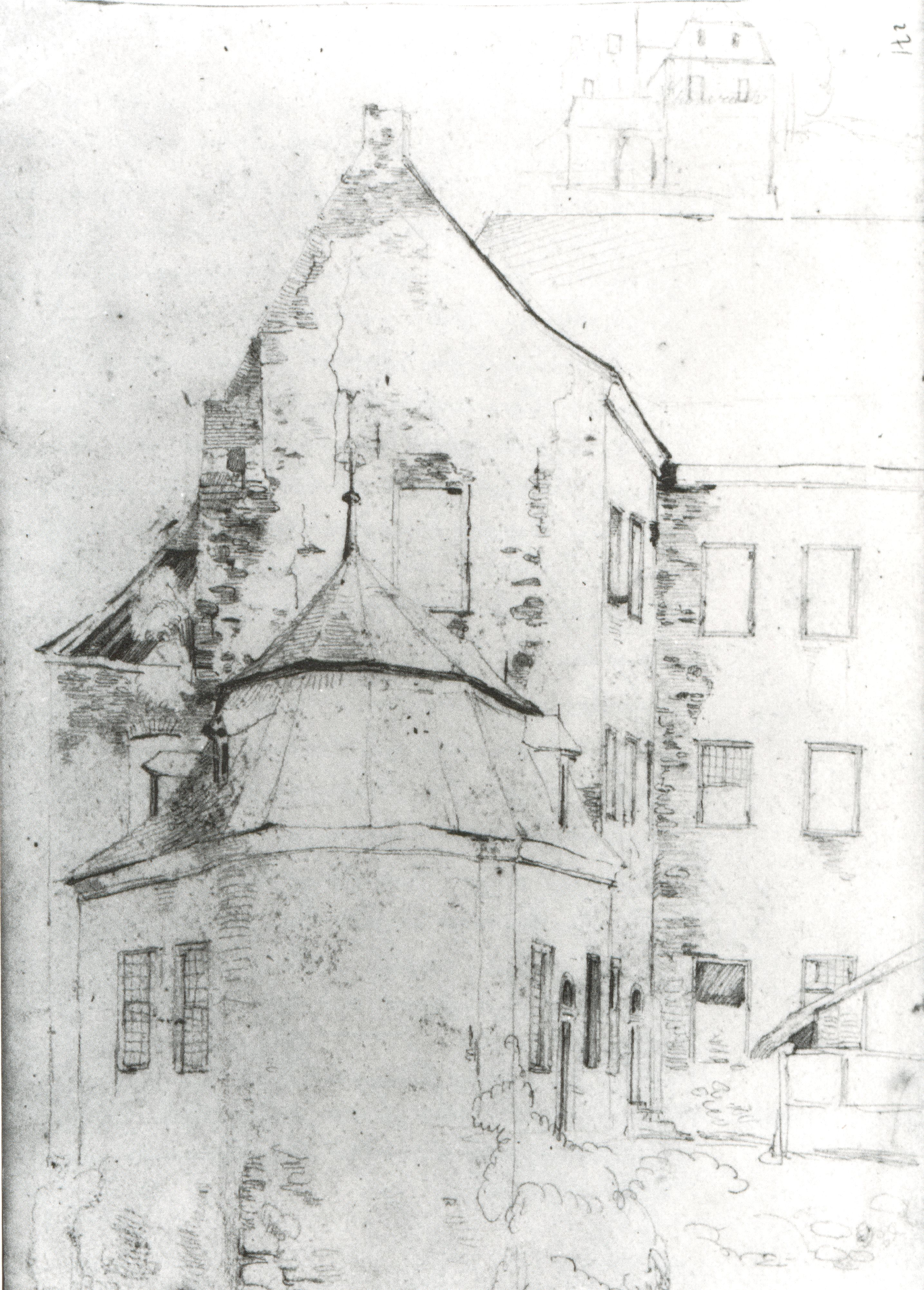 Burg Schönrath, Lohmar, mit Burgkapelle